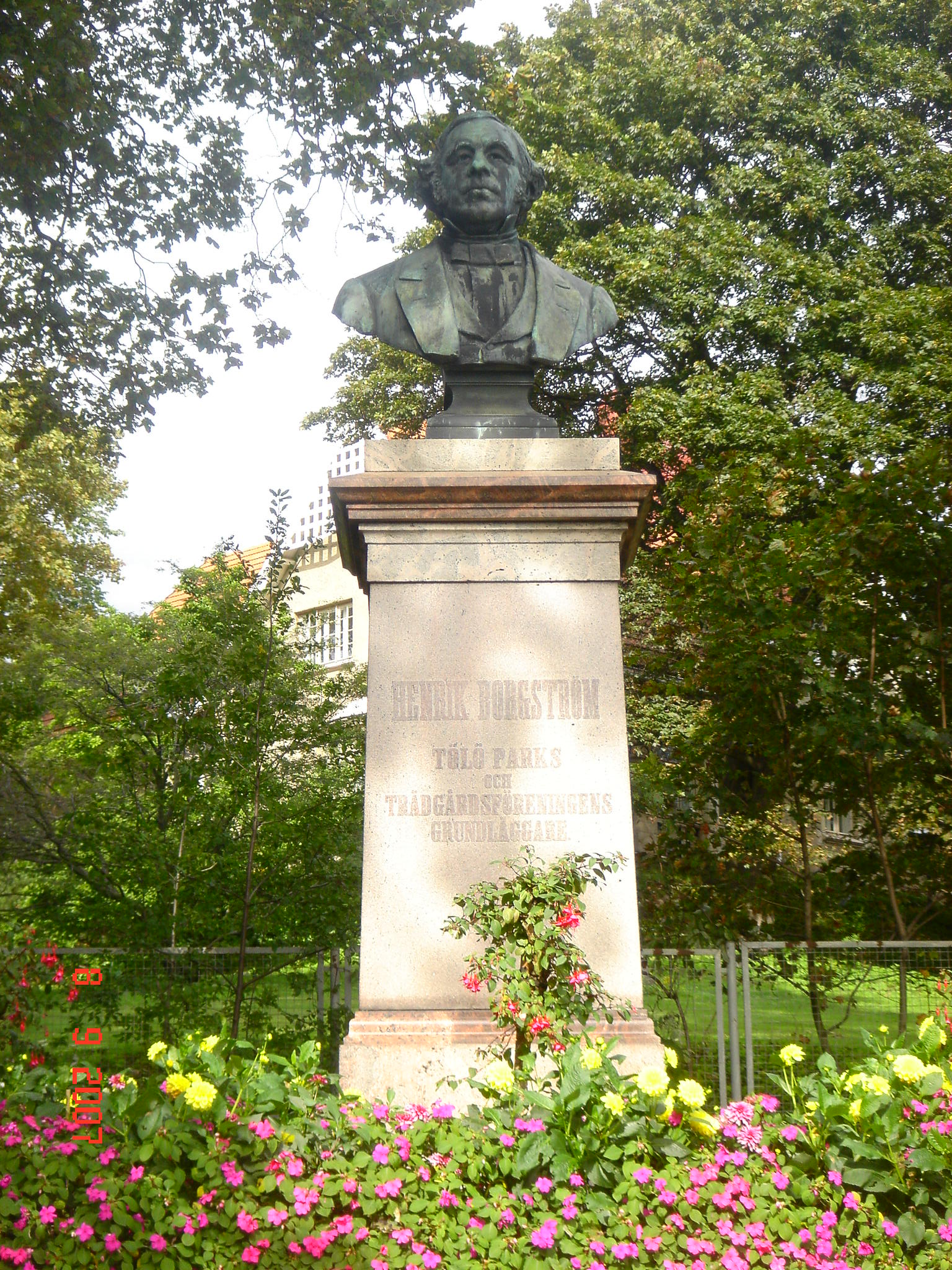 Henrik Borgströmin rintakuva Helsingin Talvipuutarhassa